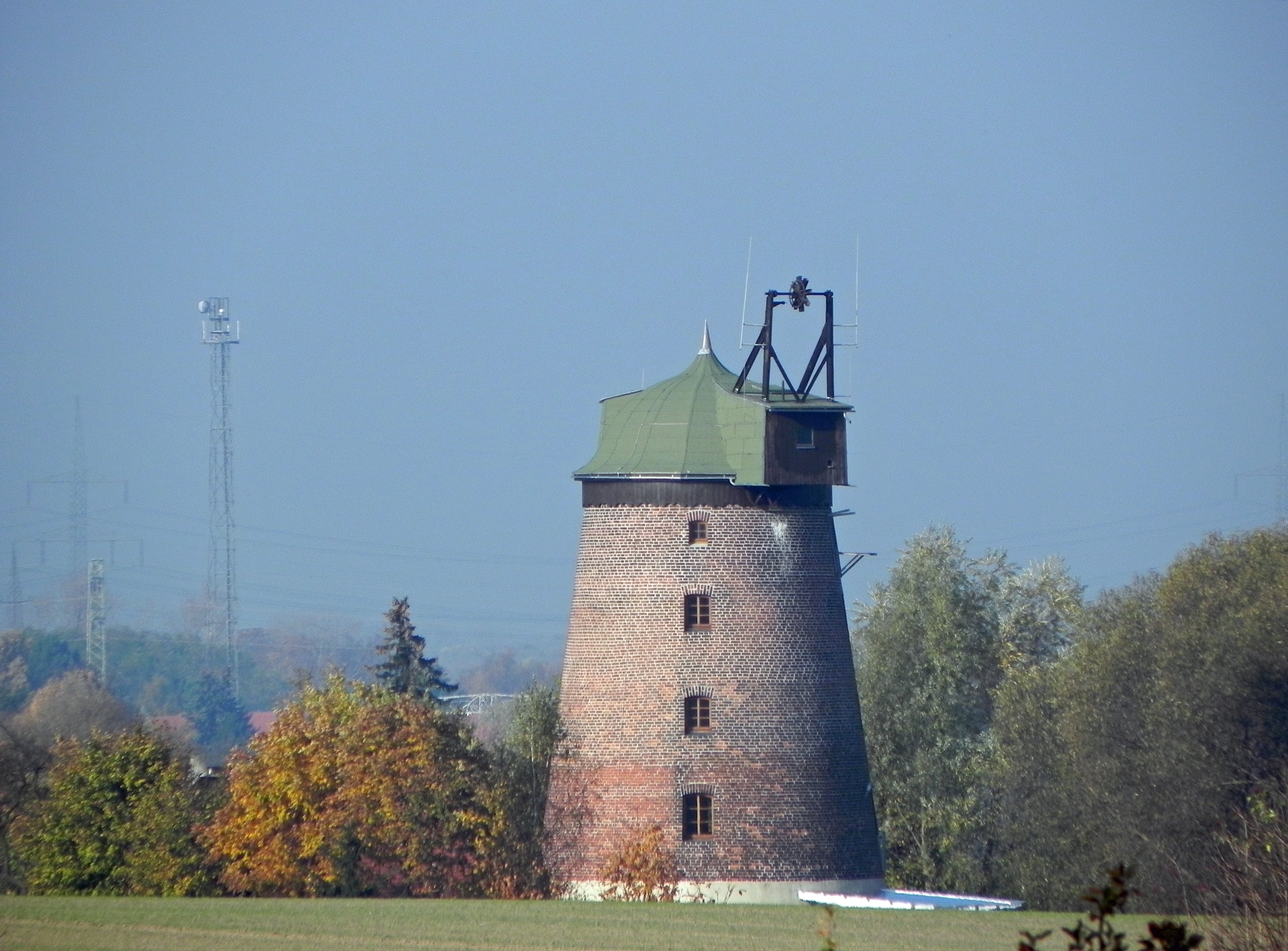 Eine der ehemals vier Turmholländer-Windmühlen auf einer Anhöhe bei Güsen, einem Ortsteil der Einheitsgemeinde Elbe-Parey. Erneuert und zu Wohnraum umgebaut, Baujahr ursprünglich 1927